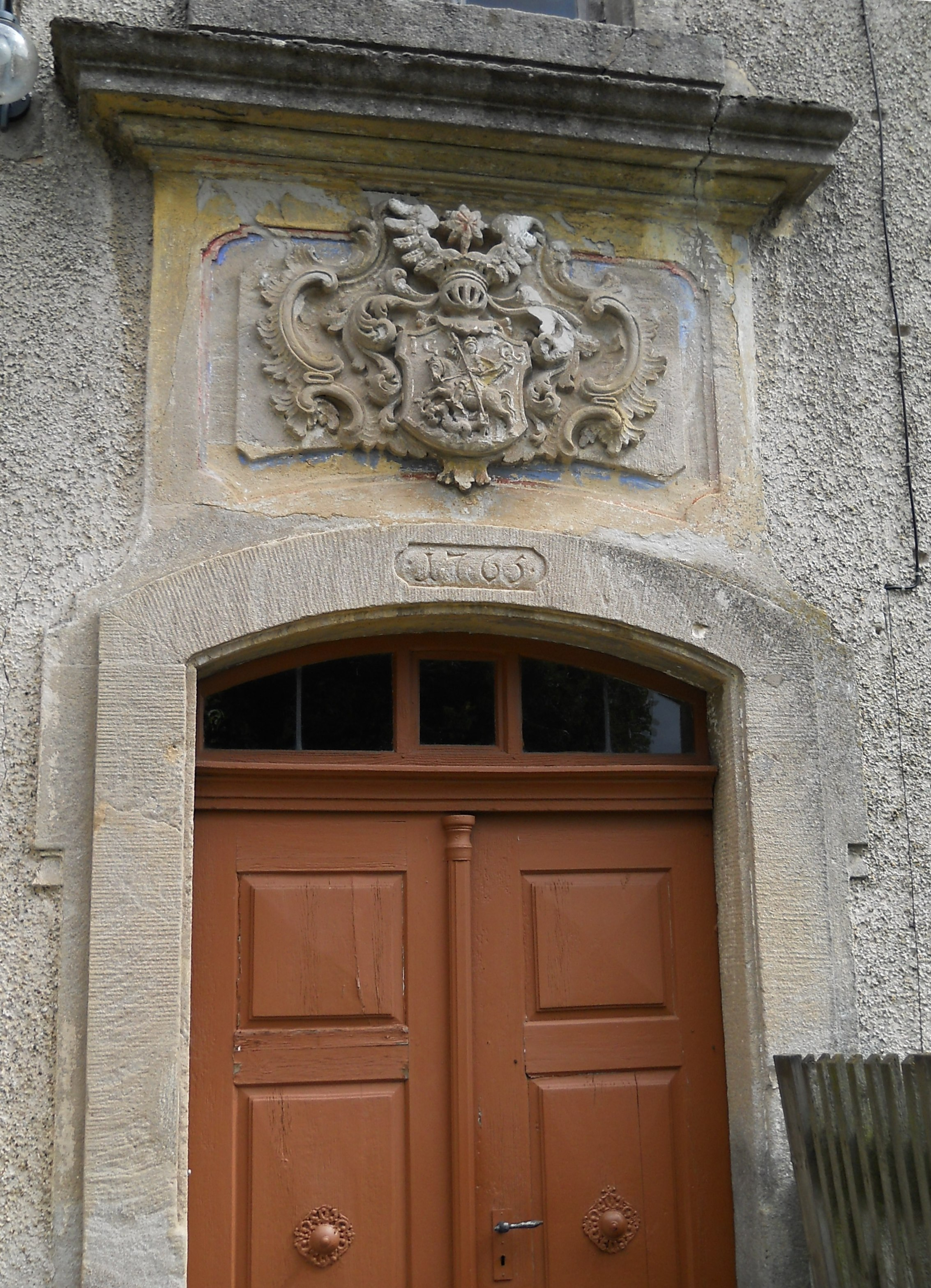 Untere Papiermühle, Ortsteil der Stadt Treuchtlingen im mittelfränkischen Landkreis Weißenburg-Gunzenhausen (Bayern), St. Georgs-Wappen Mühlengebäude von 1765 mit den Initialen des Erbauers, des Hugenotten Jacob Christoph Quinat